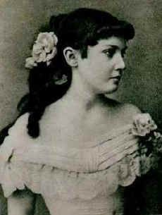 Young Draga Obrenović (1864-1903)